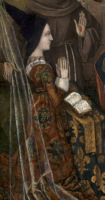 Charlotte de Savoie, détail du volet droit d'un diptyque de dévotion représentant l'Adoration des bergers avec Charlotte de Savoie et saint François.